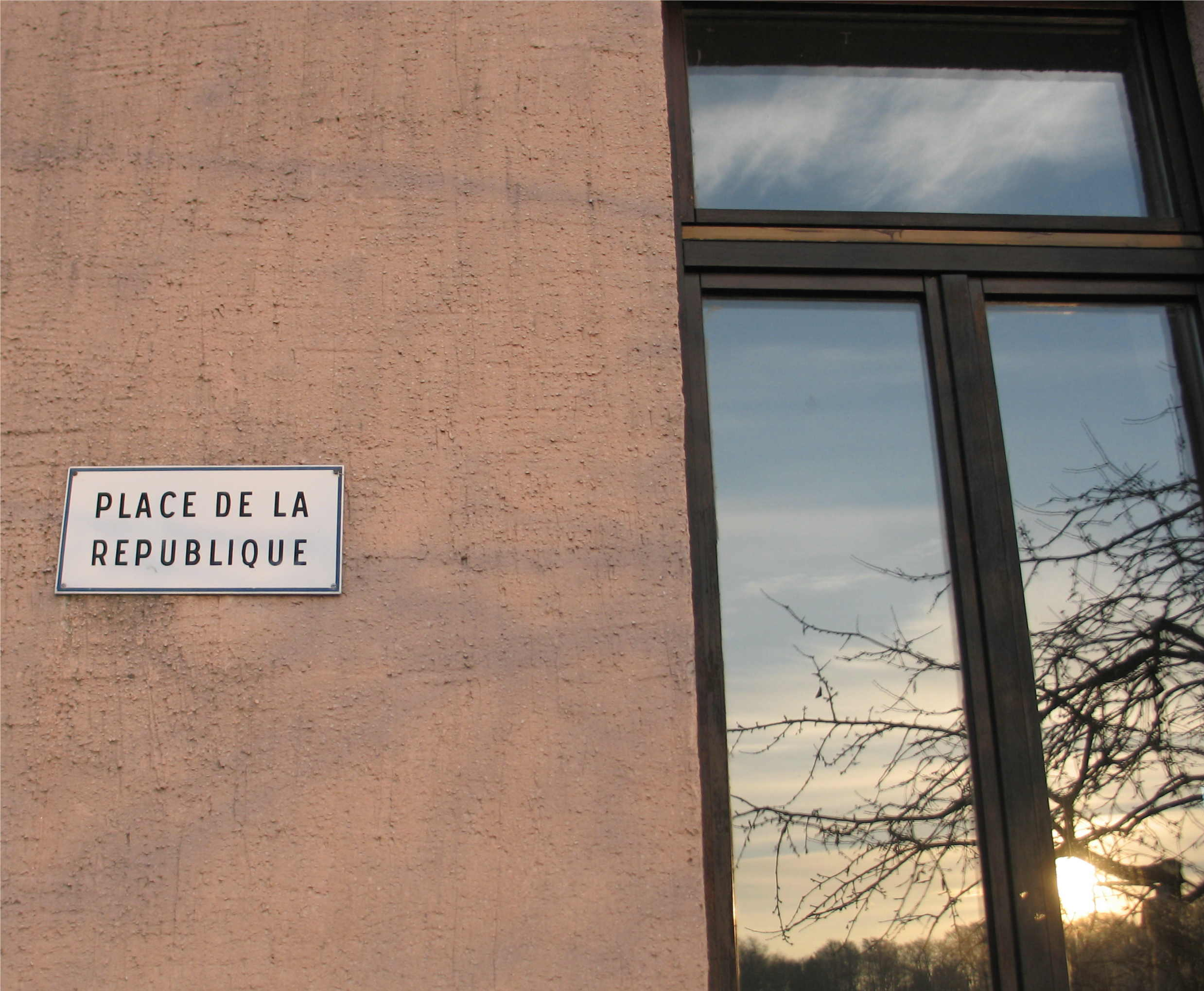 Place de la République zu Méideng